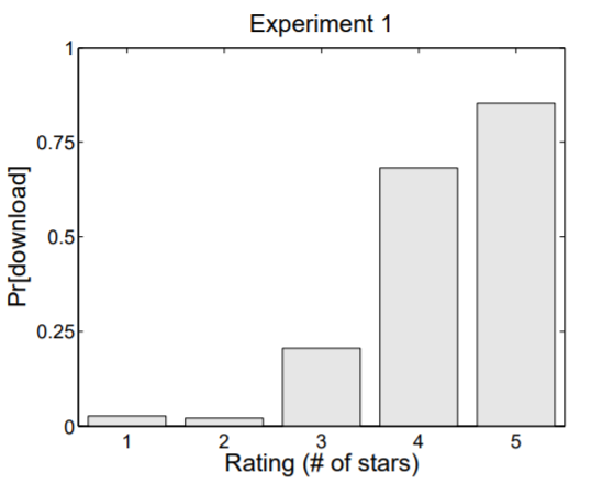 תוצאות ניסוי מספר 1